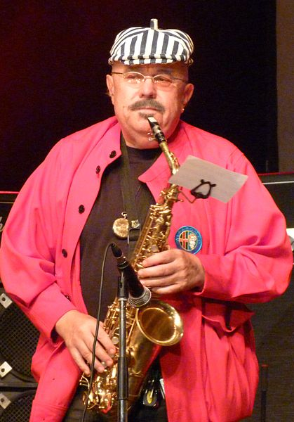 Bergendy István